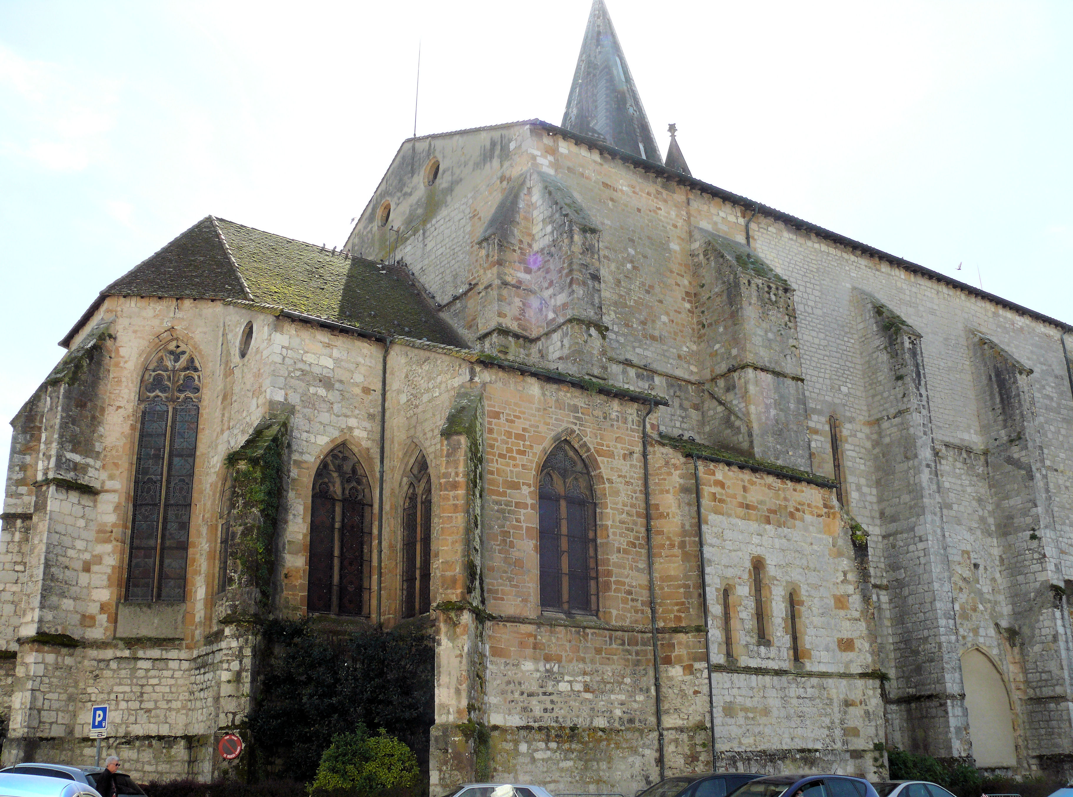 Orthez - Église Saint-Pierre - Chevet et nef